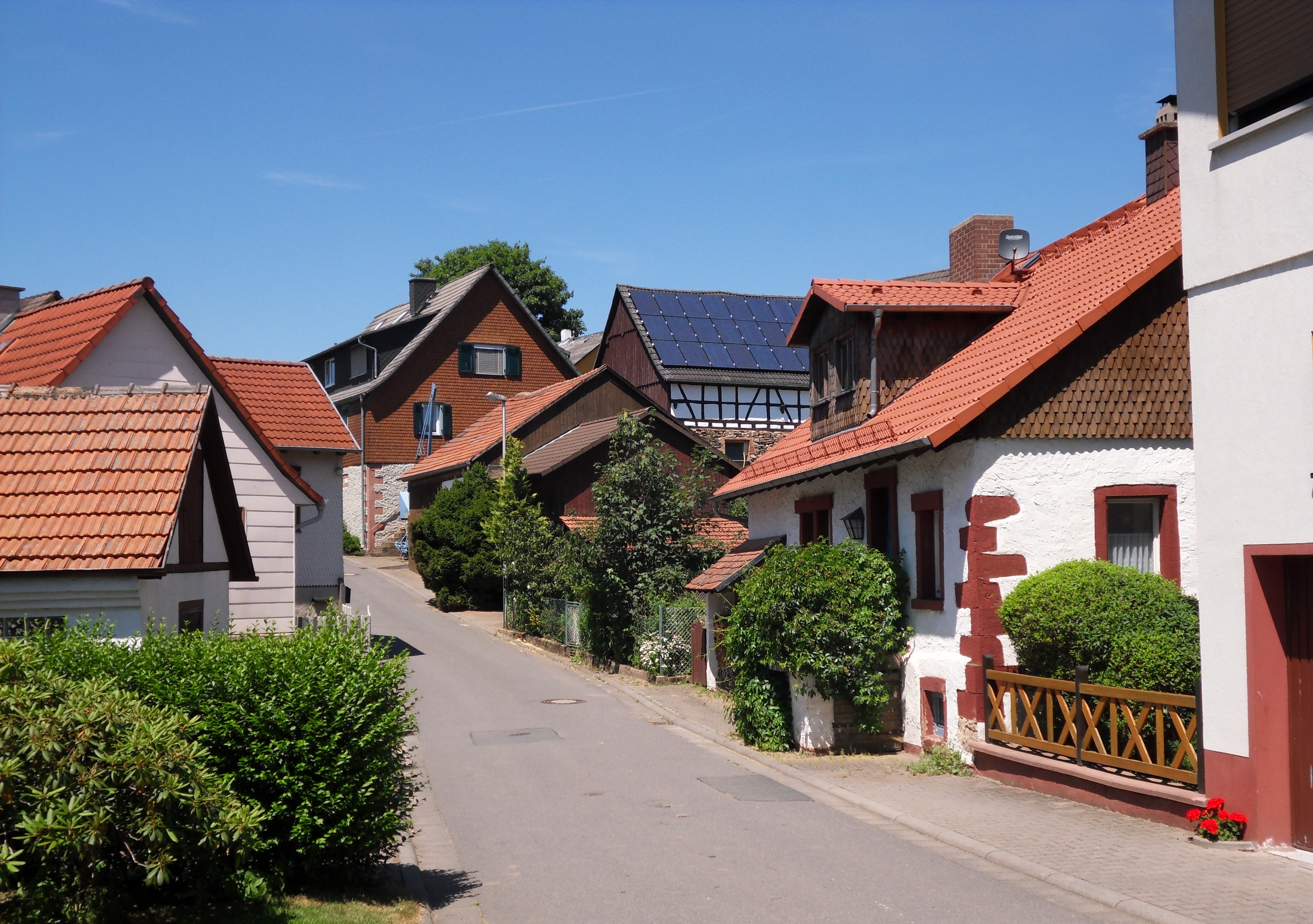 Blick in die Affhöllerbacher Straße in Böllstein im Odenwald mit Haus Nr. 1